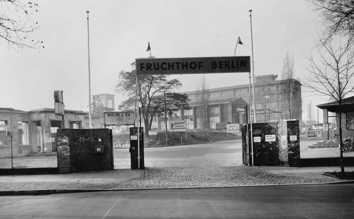 Das erste Gelände des Fruchthof Berlin in Mariendorf 1949